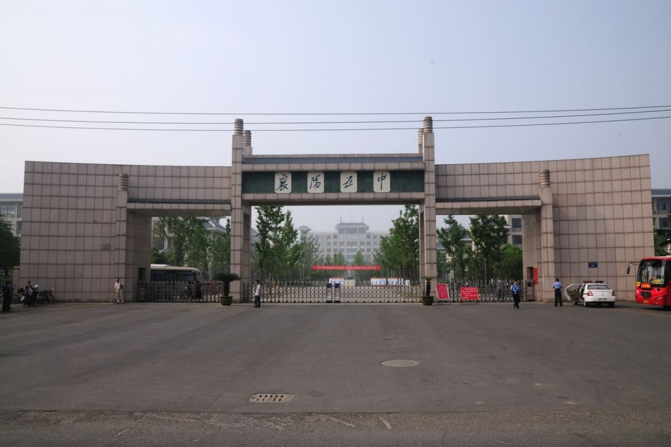 中文（中国大陆）: 襄阳五中正门